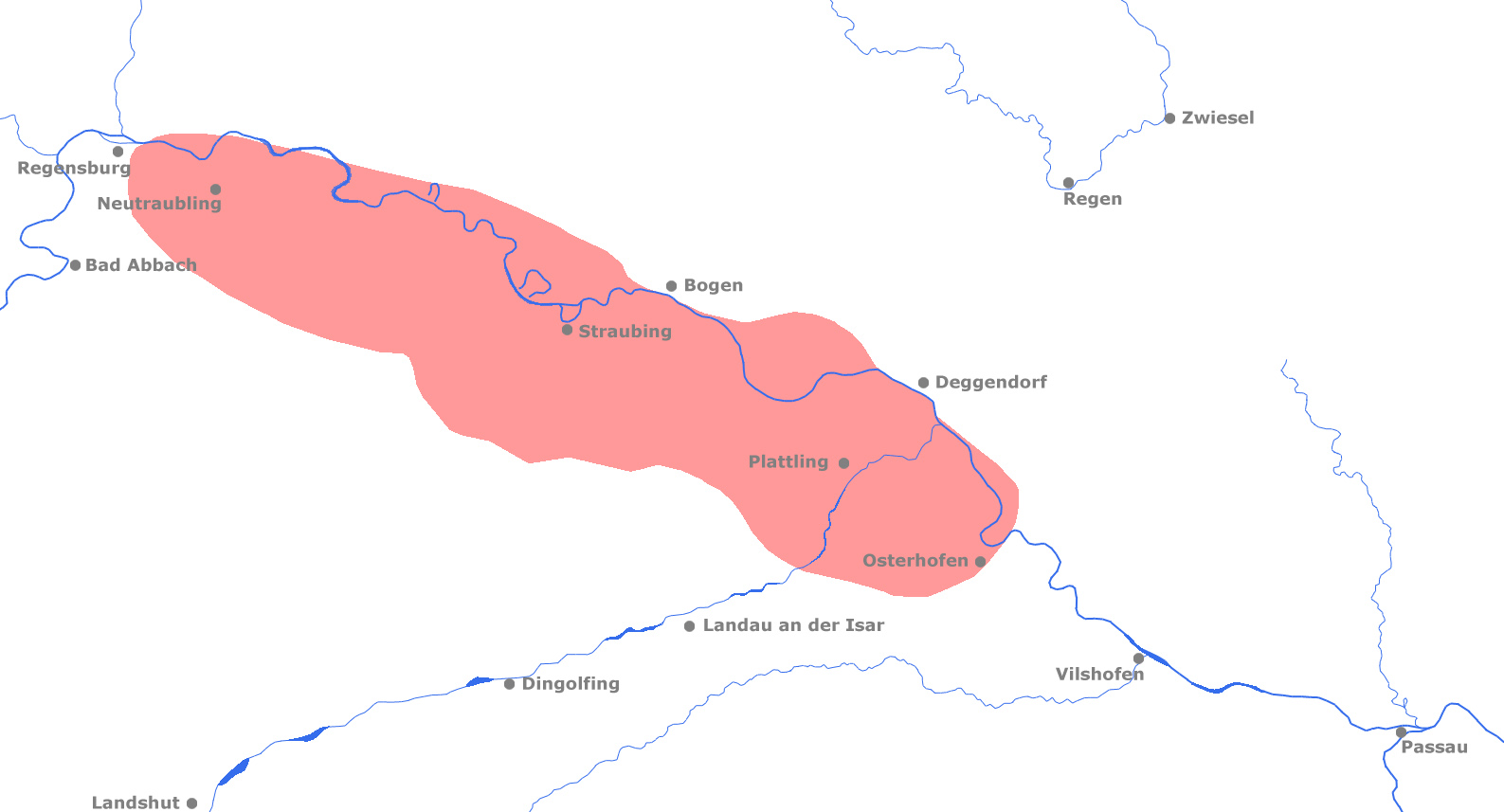 Karte des Gäubodens, Ausdehnung nach F.J. Bronner